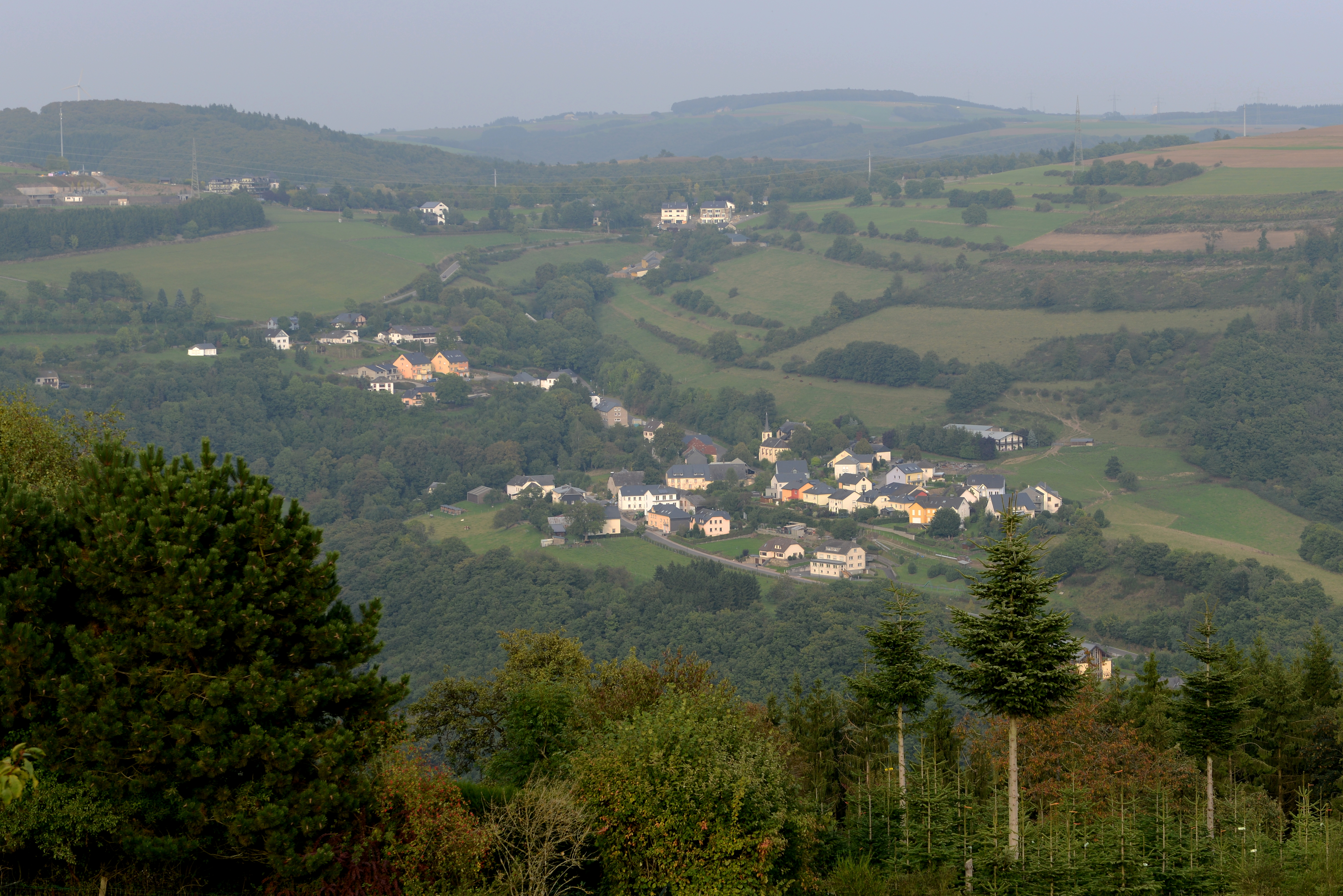 Lipperscheid vue depuis le Schlasswee à Bourscheid.